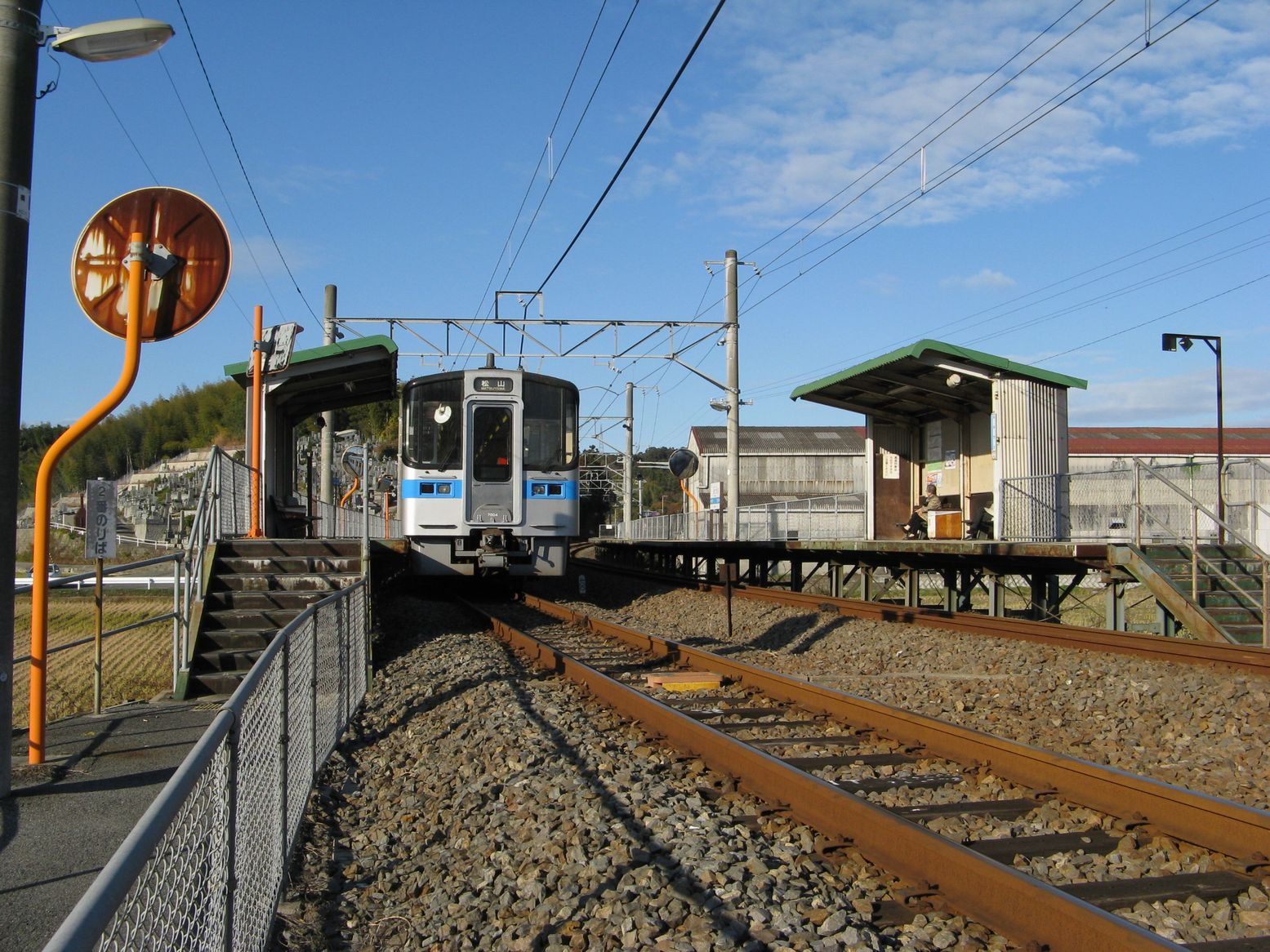 予讃線波方駅 構内を西望